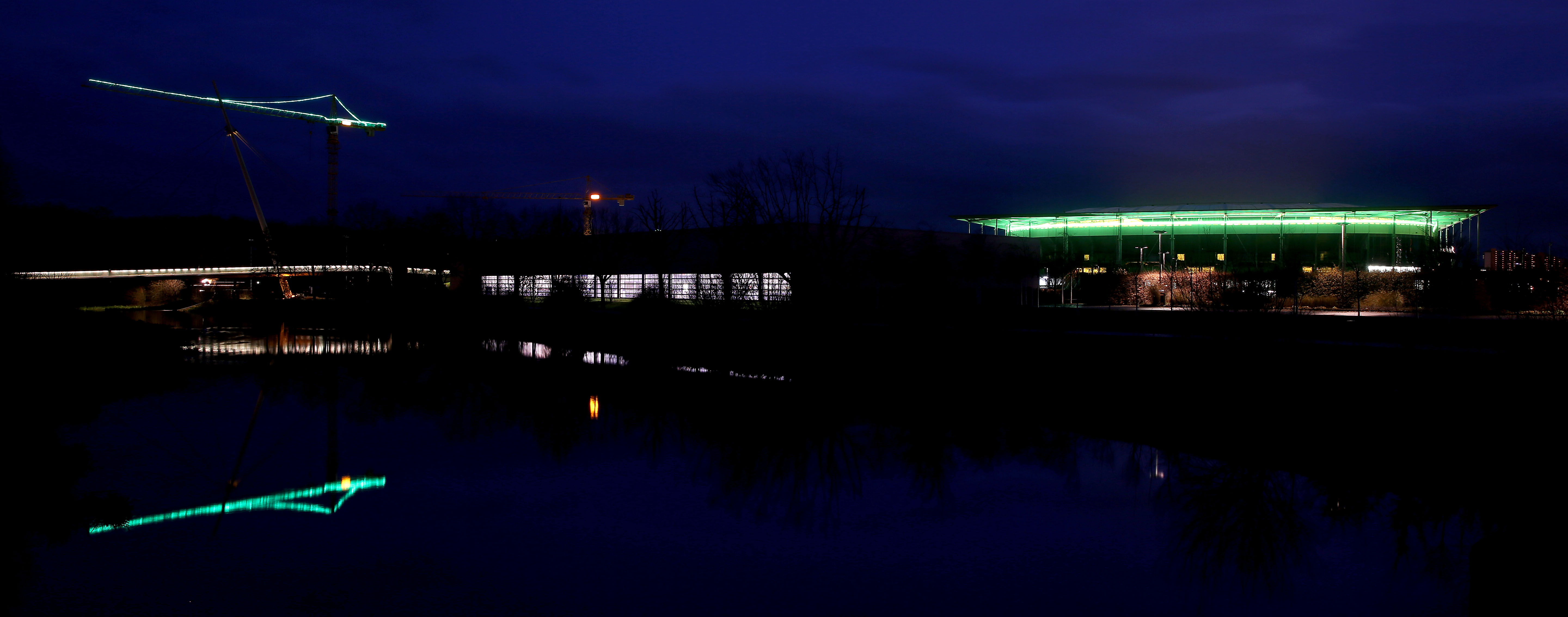 Ansicht der Volkswagen Arena bei Nacht